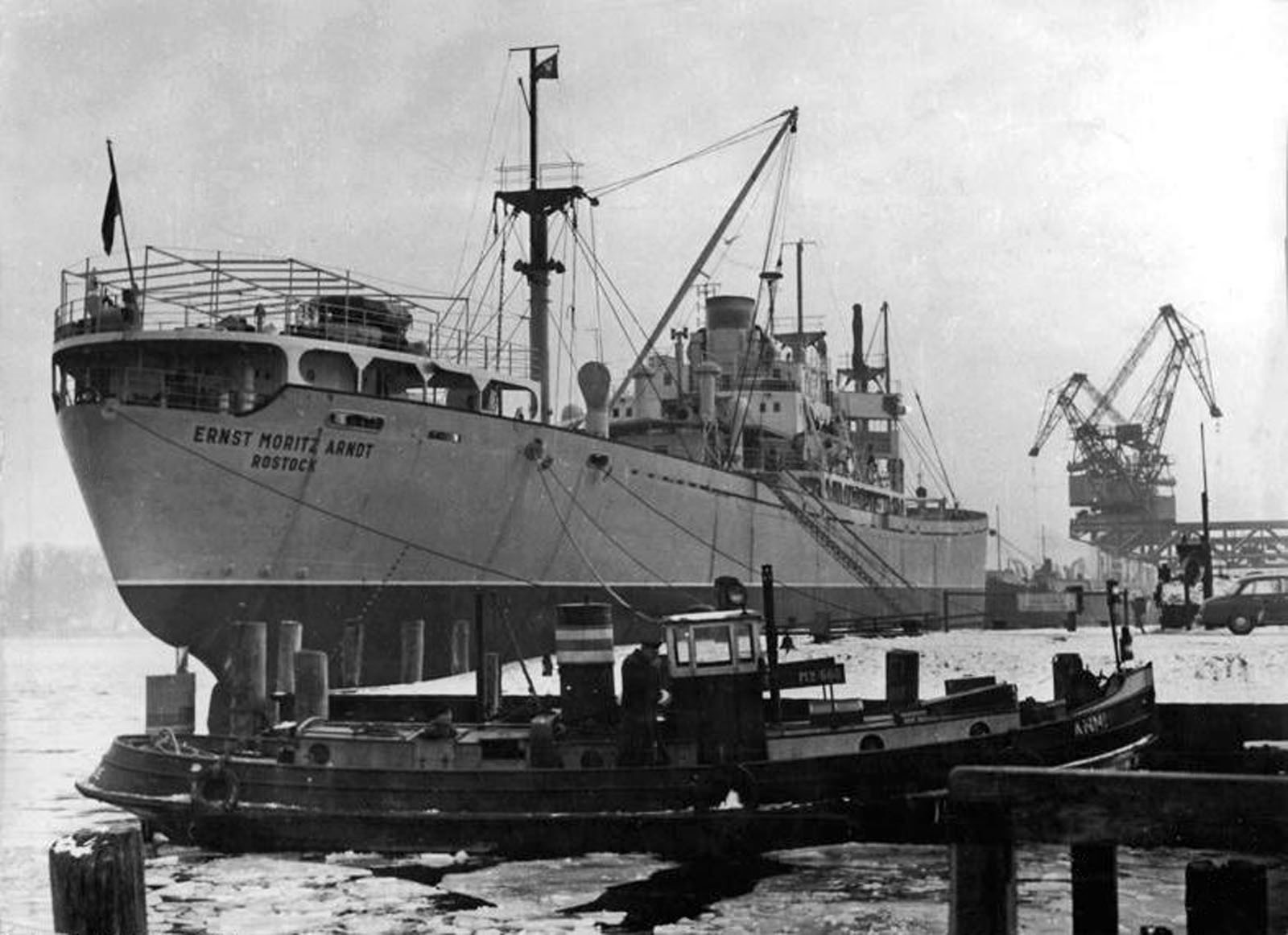 Rostock, Überseehafen, Schlepper, Frachter, Winter Zentralbild Pommerching 4.2.1960 Größter DDR-Handelsfrachter im Rostocker Hafen Das jüngste und zugleich größte Frachtschiff der DDR-Handelsflotte, der 14000 Tonnen große Handelsdampfer "Ernst-Moritz-Arndt", machte jetzt nach längeren Umbauarbeiten auf der Gdansker Reparaturwerft im Rostocker Hafen fest. In Kürze wird das von einer griechischen Reederei erworbene Schiff unter der Staatsflagge der DDR zum sowjetischen Hafen Murmansk auslaufen. UBz: Der neue Frachter "Ernst-Moritz-Arndt" an der Pier des alten Rostocker Hafens.